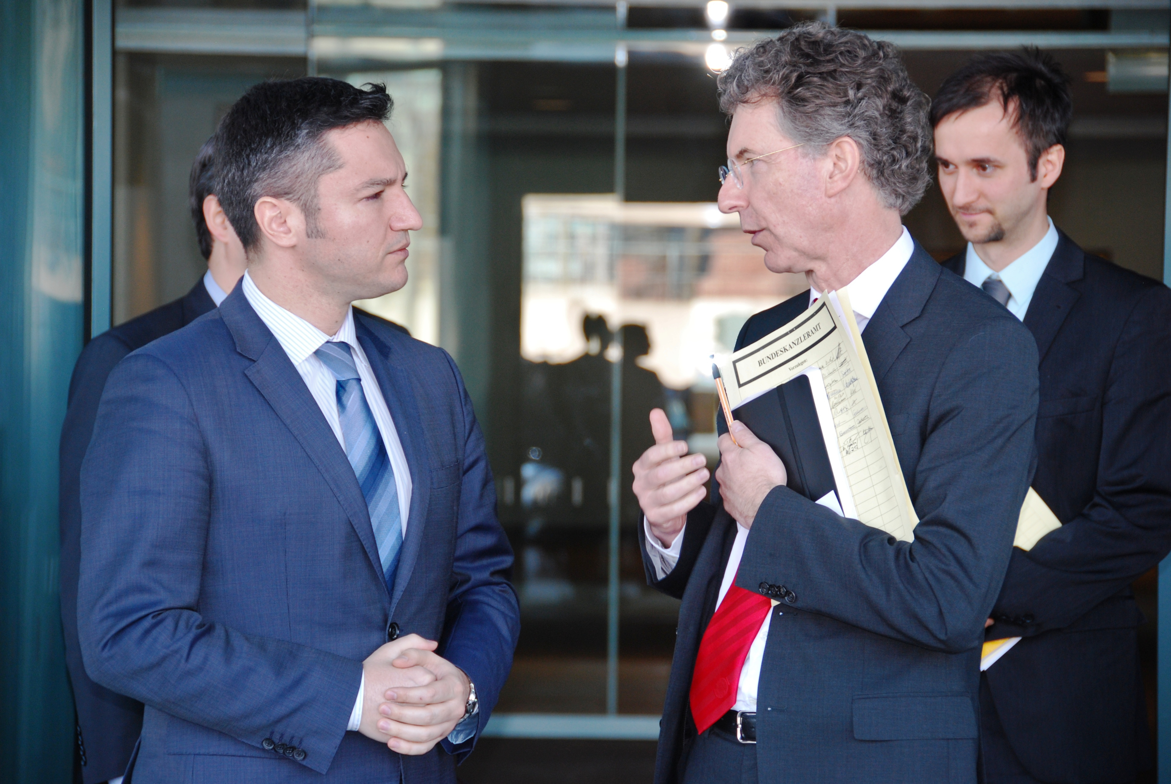 Среща с д-р Кристоф Хойсген, генерален директор по въпросите на външната политика, политиката на сигурност и политиката на развитие във Федералното канцлерство